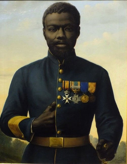 Schilderij van West-Afrikaans Korporaal Jan Kooi, geschilderd in 1882 door Johan Coenraad Leich te Harderwijk. Jan Kooi was Ridder in de Militaire Willems-Orde 4e Klasse.